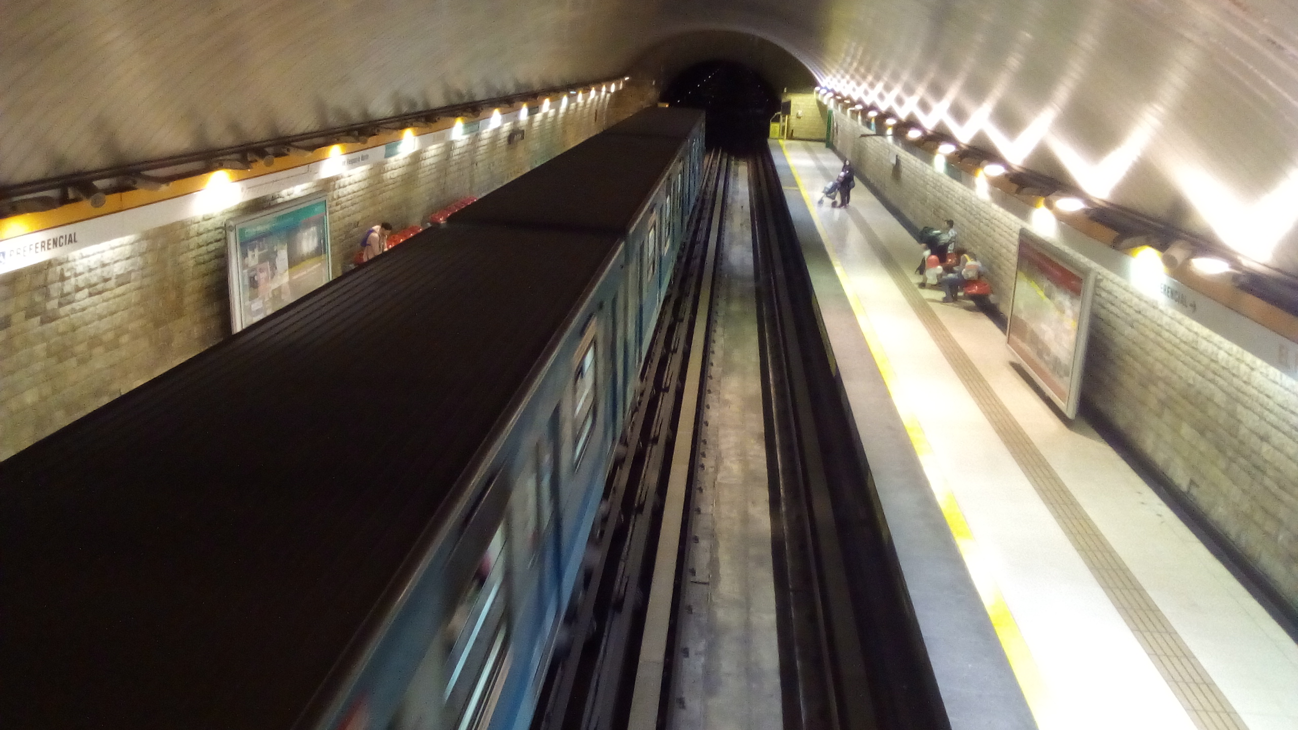 Andenes de la estación de metro El Parrón.